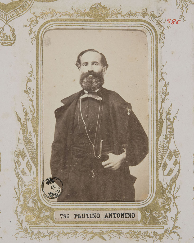 Foto di Antonino Plutino (10 dicembre 1811 – 25 aprile 1872).